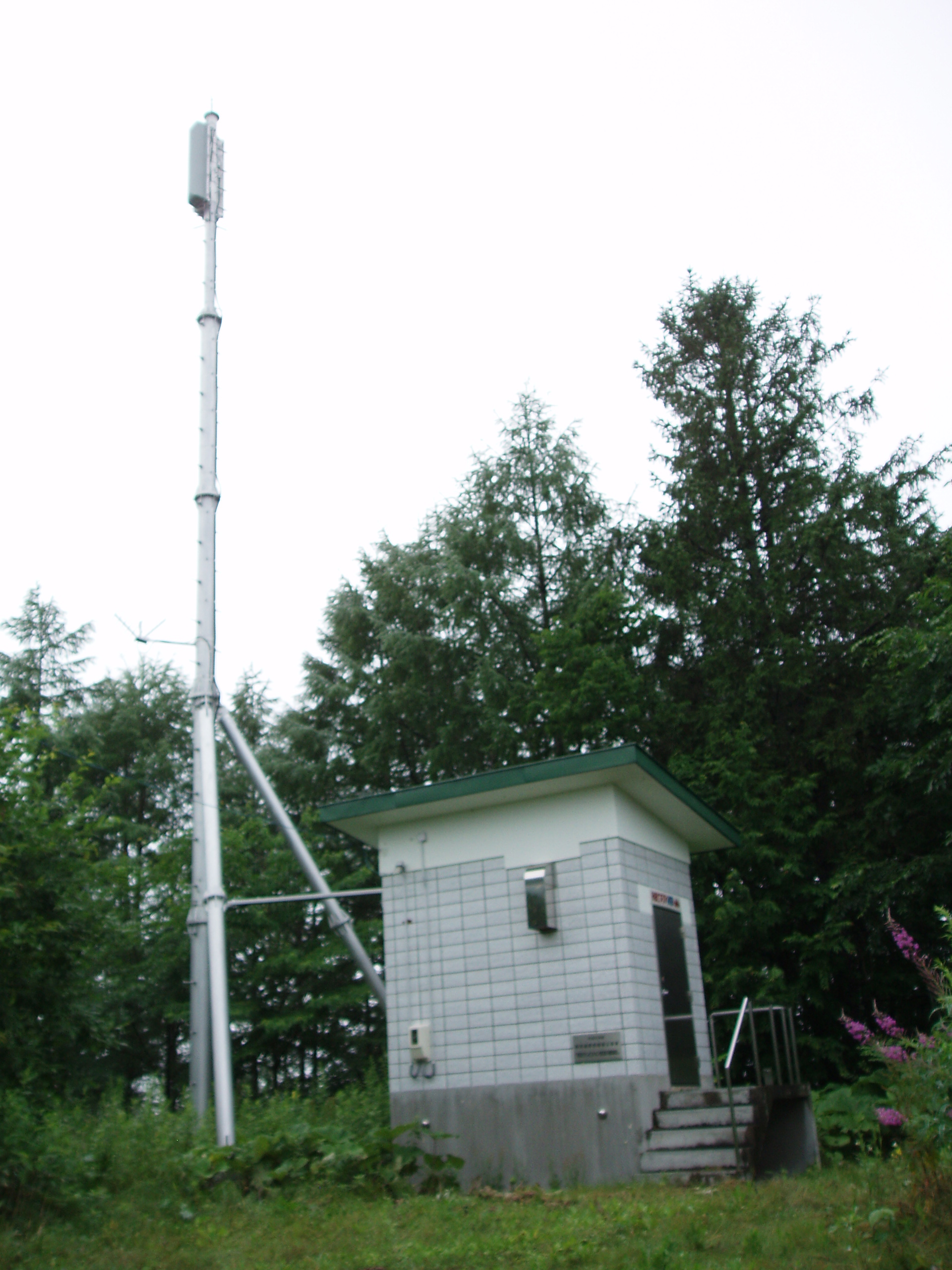 若佐中継局 HBC・STV・HTB・UHB送信設備